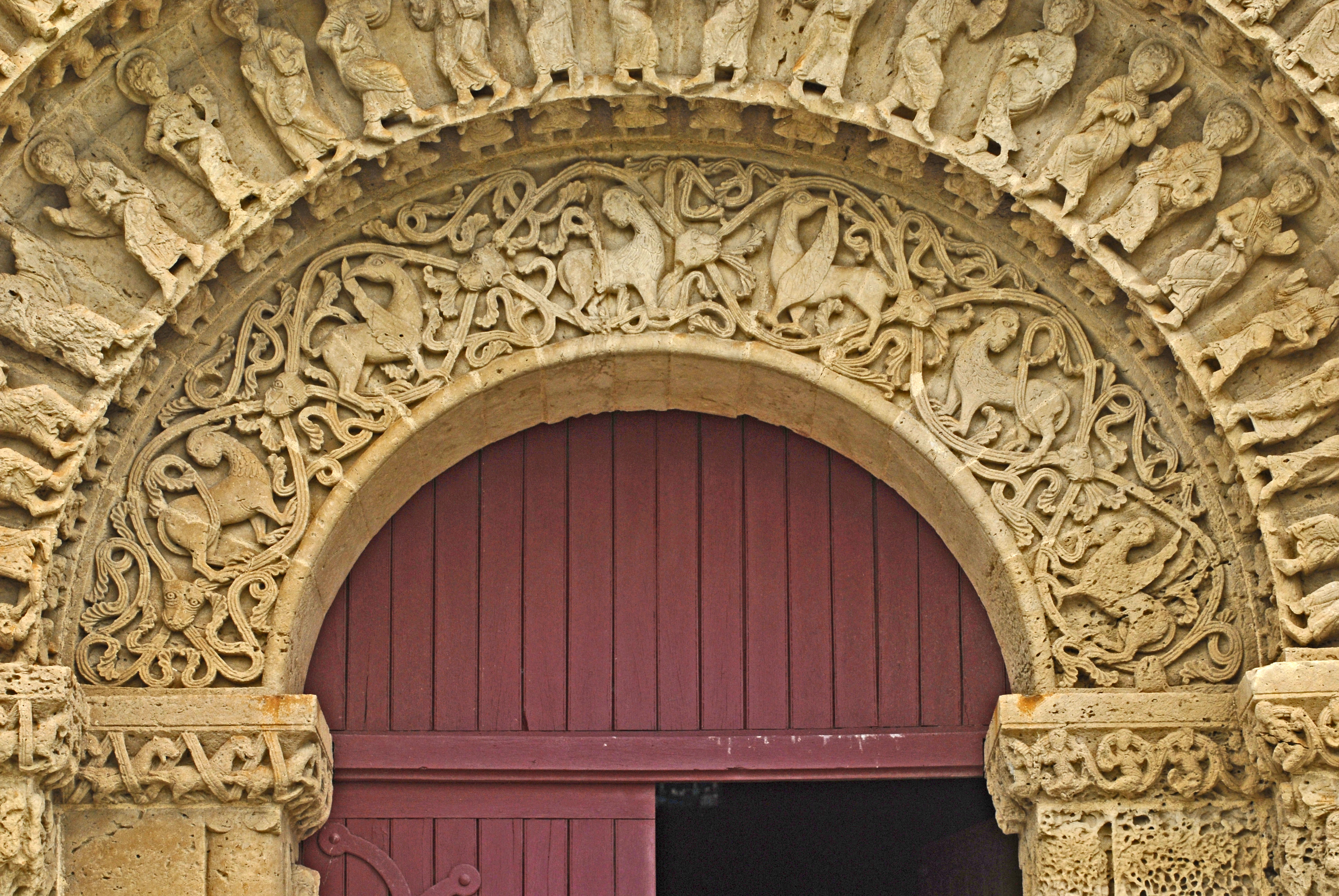 St.-Pierre Aulnay, Südportal, 1.Bogen, Stirnseite